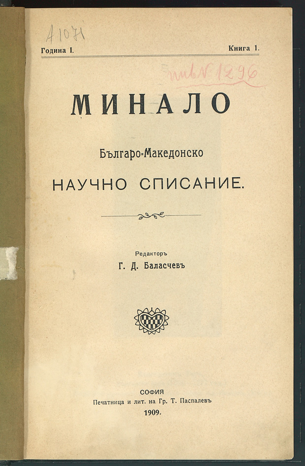 Корица на списание "Минало" на Георги Баласчев